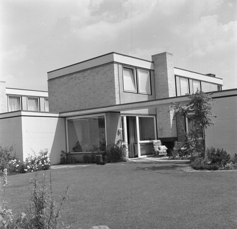 Wohnungsbau: Nürnberg-Zollhaus